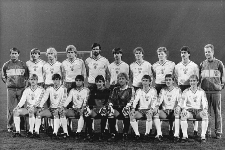 ADN-ZB-Grubitzsch-19.11.86-ma-Leipzig: Aufgebot für das Spiel gegen Frankreich. Der DDR-Fußballverband hat folgendes Aufgebot für das Europameisterschafts-Qualifikationsspiel gegen Frankreich am 19.11.86 in Leipzig nominiert: Vorn von links: Detlef Schößler (1. FC Magdeburg), Jörg Stübner, Ulf Kirsten (beide SG Dynamo Dresden), Rene Müller (1. FC Lok Leipzig), Jörg Weißflog (BSG Wismut Aue), Andreas Thom, Frank Rohde, Christian Backs (alle BFC Dynamo), STehend von links: Assistenztrainer Harald Irmscher, Hans Richter, Matthias Liebers, Uwe Zötzsche (alle 1. FC Lok Leipzig), Dirk STahmann (1. FC Magdeburg), Rico Steinmann (FC Karl-Marx-Stadt), Matthias Döschner, Matthias Sammer (beide SG Dynamo dresden), Frank Pastor (BFC Dynamo) und Trainer Bernd STange.